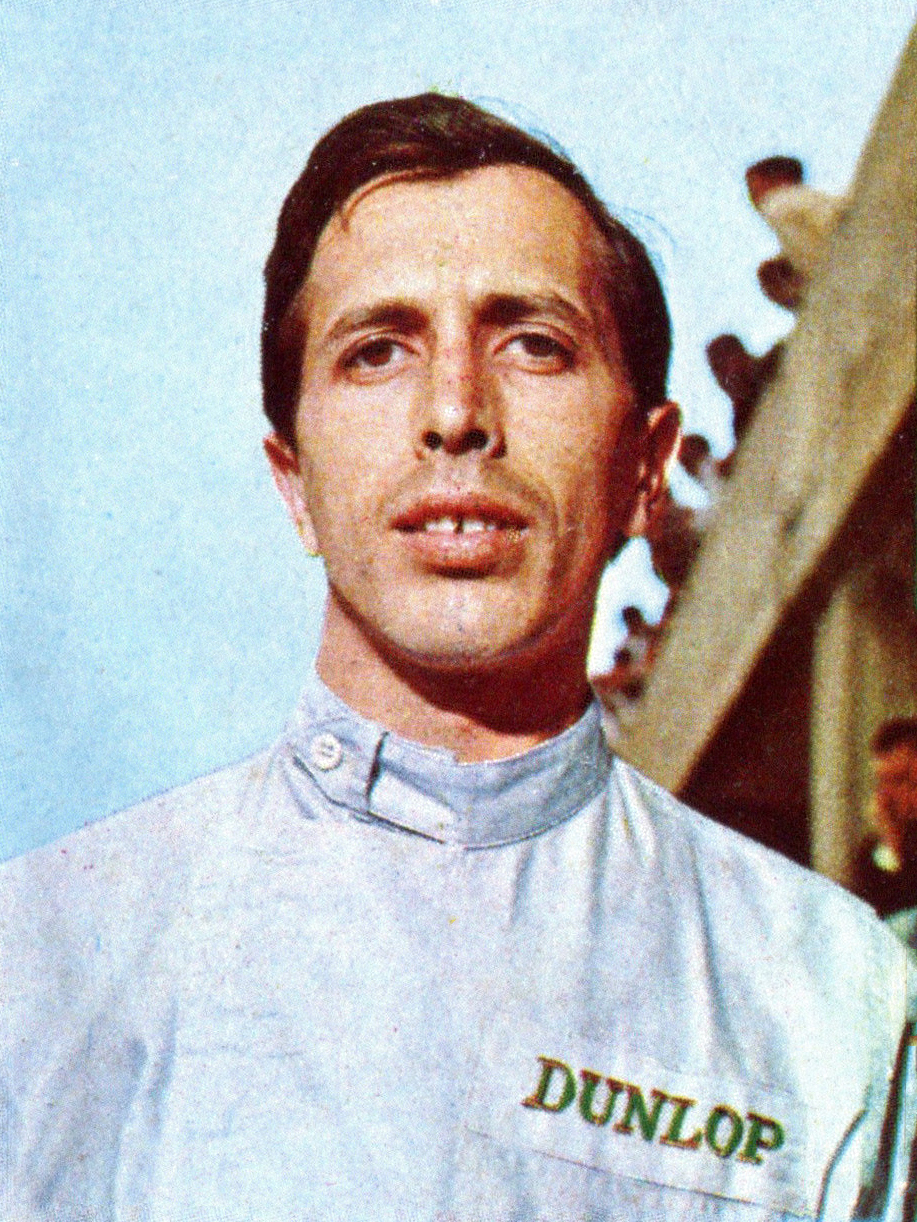 CAMPIONI DELLO SPORT 1966/67 - Figurina/Sticker n. 69 - G. RUSSO